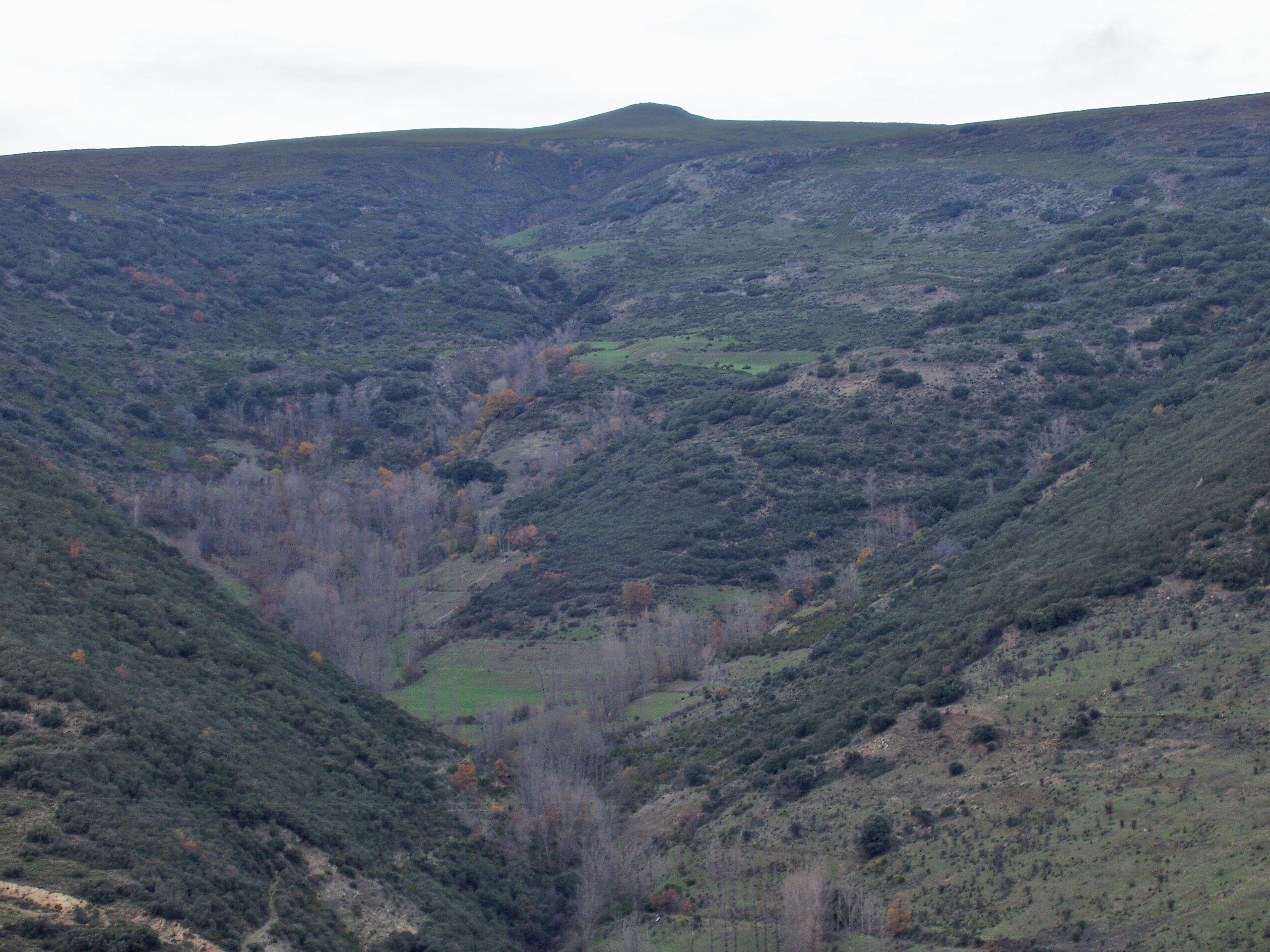 Monte Llagarino, La Cabrera (León).